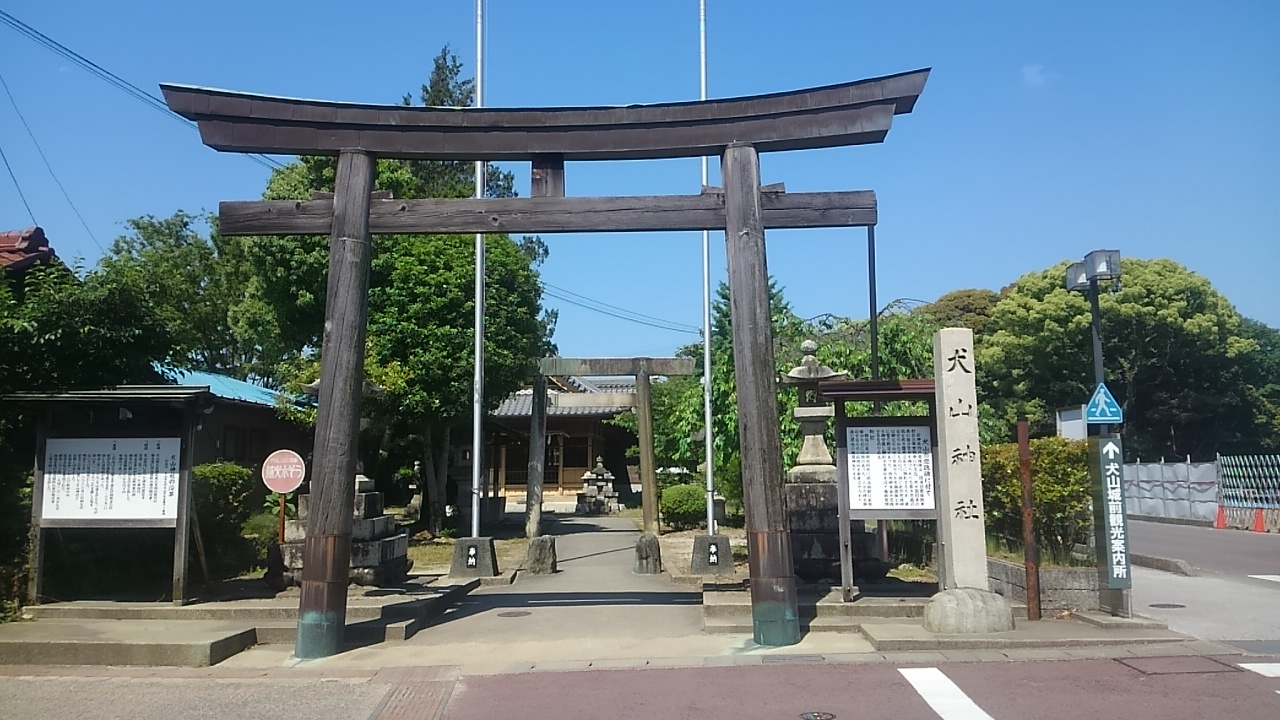 成瀬歴代を祀る犬山神社